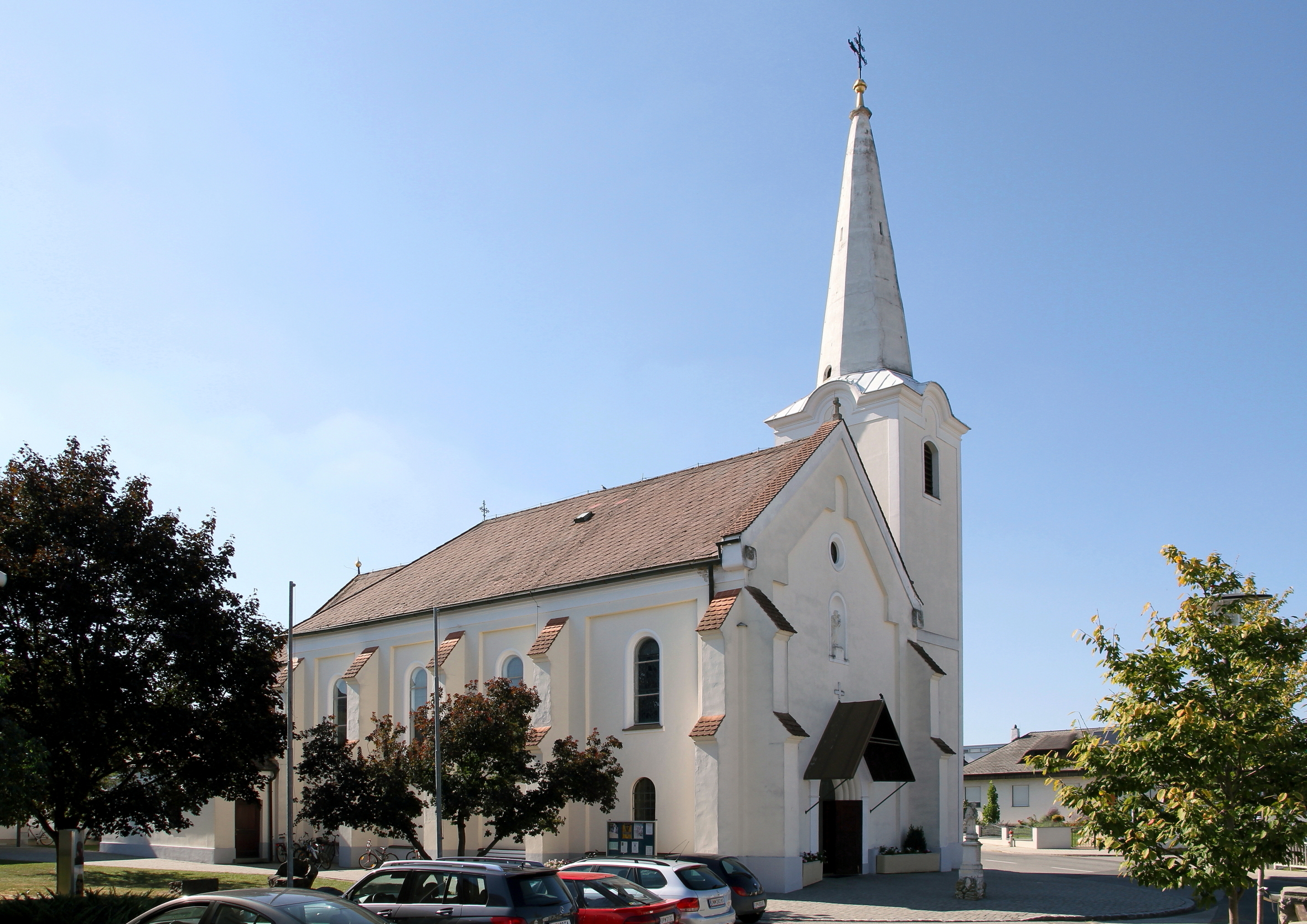 Katholische Pfarrkirche hl. Antonius von Padua in der burgenländischen Marktgemeinde Raiding. Die Kirche wurde 1927 unter Einbeziehung des alten Turmes an Stelle einer älteren Kirche errichtet.